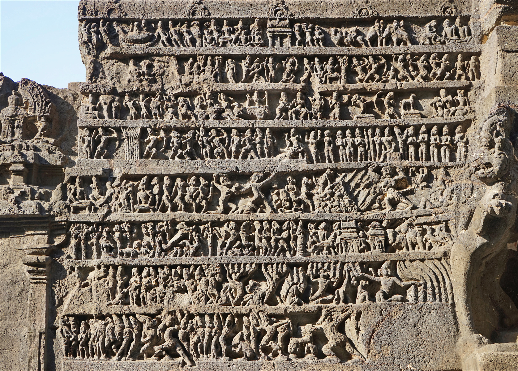 Frise de scènes sculptées du Ramayana sur la paroi nord du temple monolithe de Kailasha ou Kailâsanâtha (725-755) "La Kailasa (grotte 16) ou temple de Kailasha est un remarquable exemple de temple indien creusé dans la roche du fait de ses proportions impressionnantes, de la maîtrise des techniques architecturales dont elle témoigne et de son décor sculpté. La grotte 16, consacrée à Shiva, aurait été commencée par le roi rashtrakuta, Krishna Ier ; elle tire son nom de la montagne dont celui-ci était originaire dans l'Himalaya, le pic neigeux de Kailasa. Le temple tout entier consiste en un sanctuaire avec lingam derrière une salle à shikhara dravidienne, un mandapa à toit plat soutenu par 16 piliers, avec un porche séparé pour Nandi entouré par une cour ouverte à laquelle on accède par un gopura peu élevé. La sculpture majestueuse représentant Ravana tentant de gravir le Kailasa, le séjour de Shiva, avec toute la puissance qui s'en dégage, est un point de référence pour tout l'art indien." extrait du site de l'UNESCO sur les grottes d'Ellora (patrimoine mondial) Les grottes d'Ellora Trente-quatre monastères et temples ont été creusés en succession serrée dans la paroi d'une haute falaise basaltique, non loin d'Aurangabad, contribuant à faire revivre une brillante civilisation ancienne dans une séquence ininterrompue de monuments datables de 600 à 1000. L'ensemble d'Ellora est une réalisation artistique unique et un tour de force technique. Avec ses sanctuaires consacrés respectivement au bouddhisme, au brahmanisme et au jaïnisme, il illustre l'esprit de tolérance caractéristique de l'Inde ancienne. (site de l'UNESCO) Voir les temples monolithiques plus anciens de Mahabalipuram, (Inde du sud)